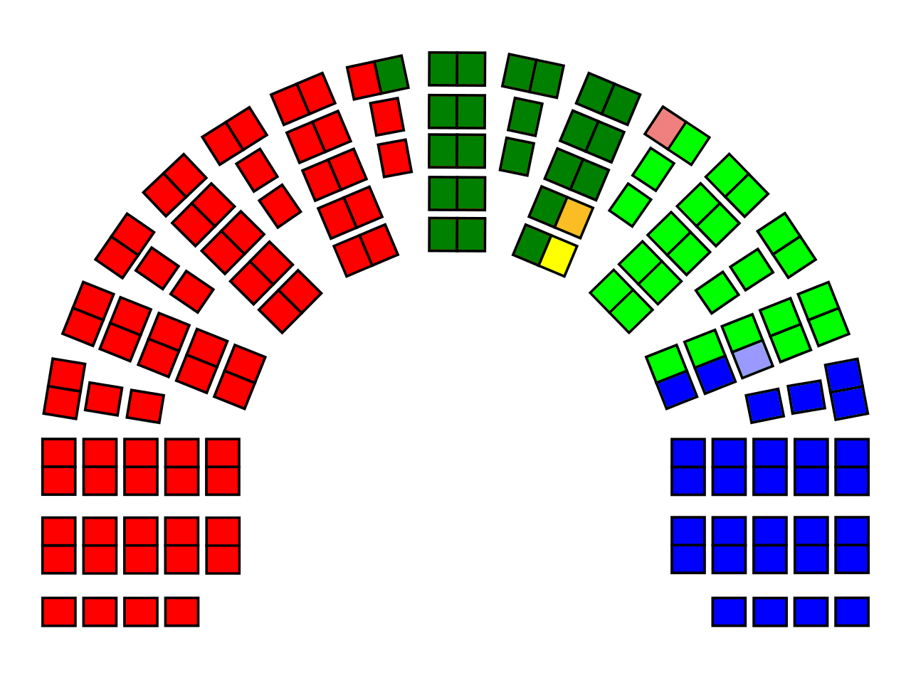 Mandatfordelingen etter Stortingsvalget 1933 illustrert med seter Arbeiderpartiet Bondepartiet Samfundspartiet Kristelig Folkeparti Radikale Folkeparti Venstre Frisinnede Folkeparti Høyre